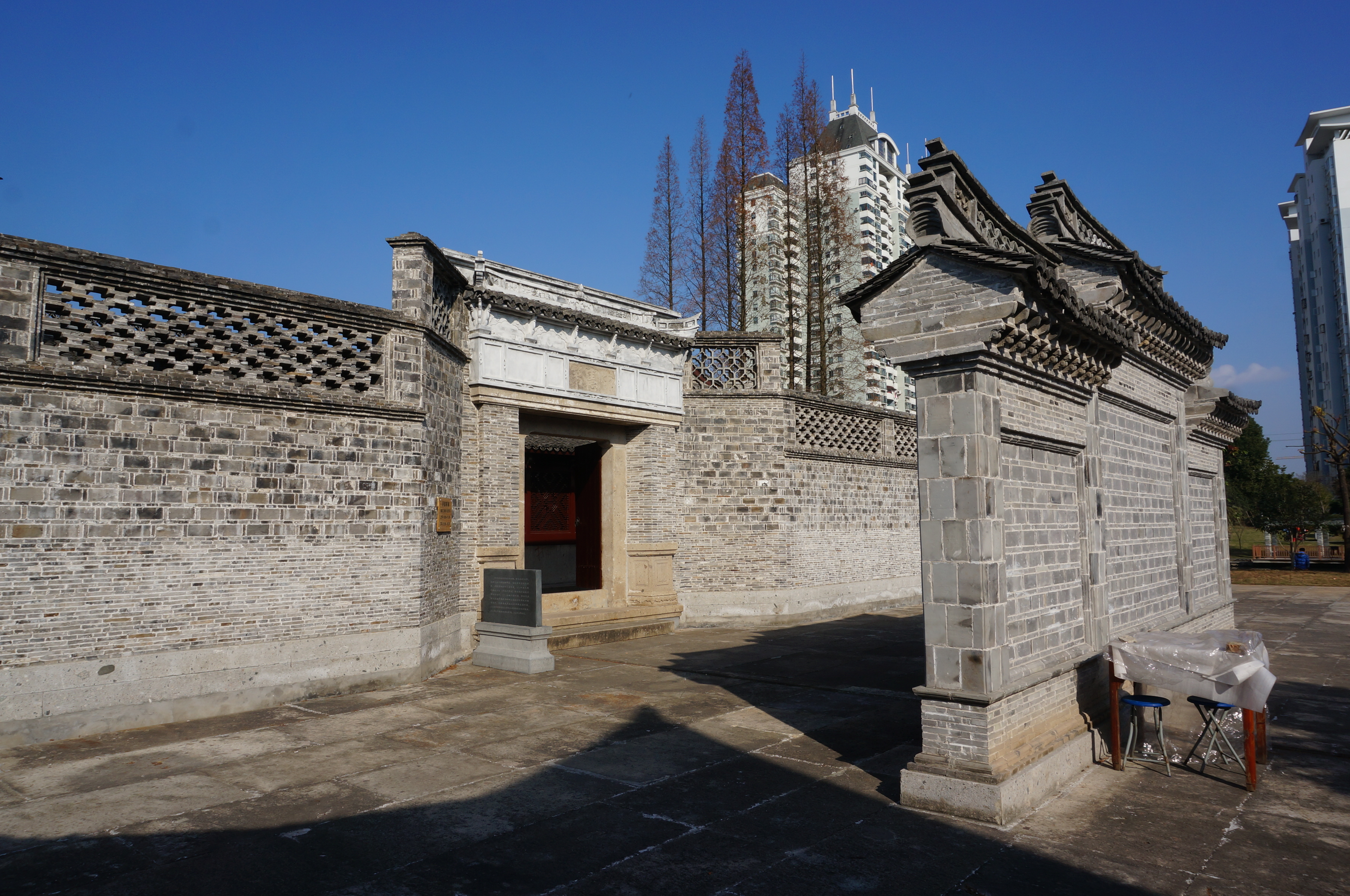 黄岩林元荣故居（中共台属特委机关旧址），影壁及大门。